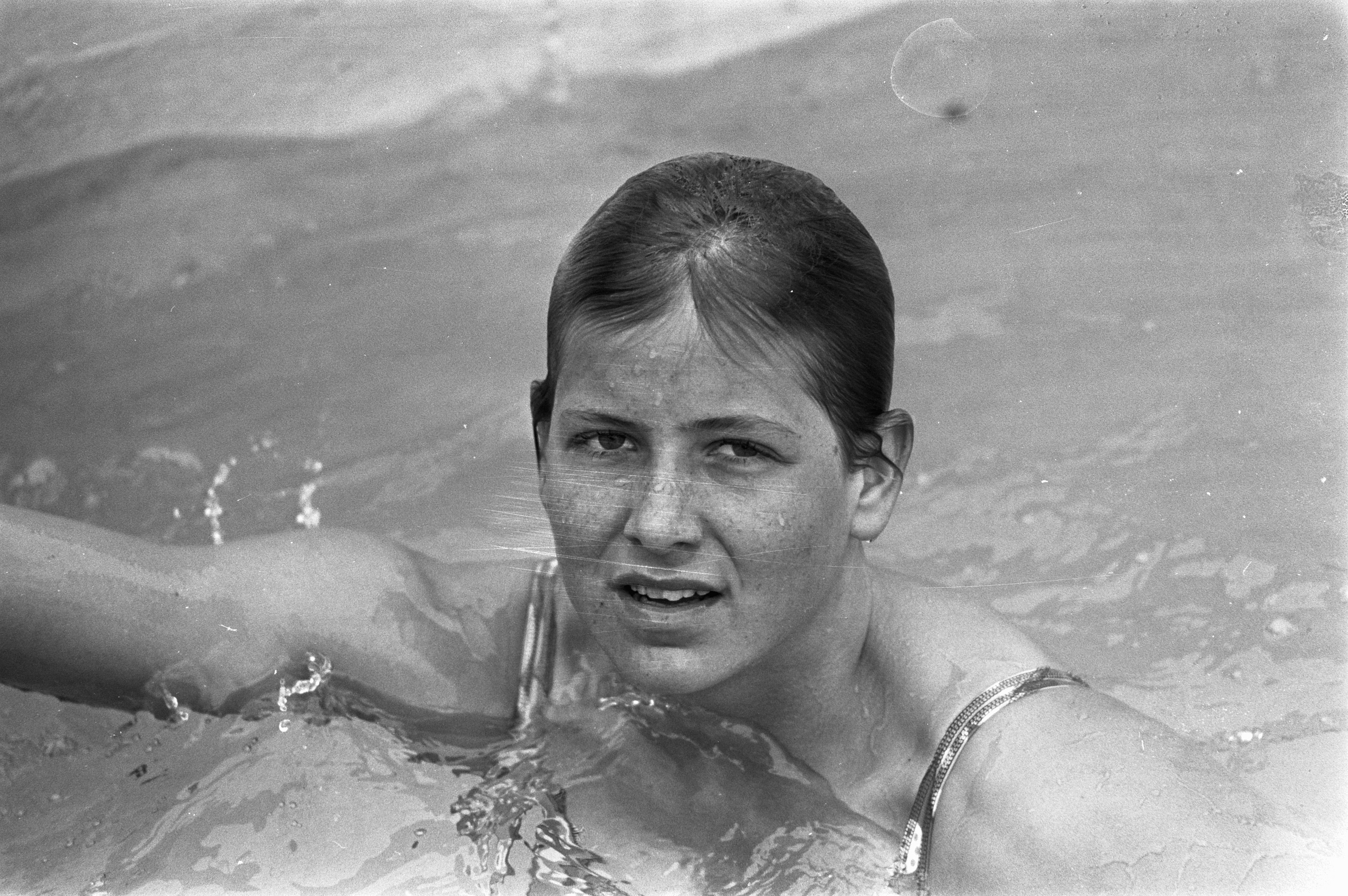 Collectie / Archief : Fotocollectie Anefo Reportage / Serie : Nationale jeugdzwemwedstrijden in Den Haag Beschrijving : Zwemster Josien Elzerman Datum : 28 mei 1972 Locatie : Den Haag, Zuid-Holland Trefwoorden : jeugd, portretten, sport, wedstrijden, zwembaden, zwemmen Persoonsnaam : Elzerman, Josien Fotograaf : Hans Peters / Anefo Auteursrechthebbende : Nationaal Archief Materiaalsoort : Negatief (zwart/wit) Nummer archiefinventaris : bekijk toegang 2.24.01.05 Bestanddeelnummer : 925-6241